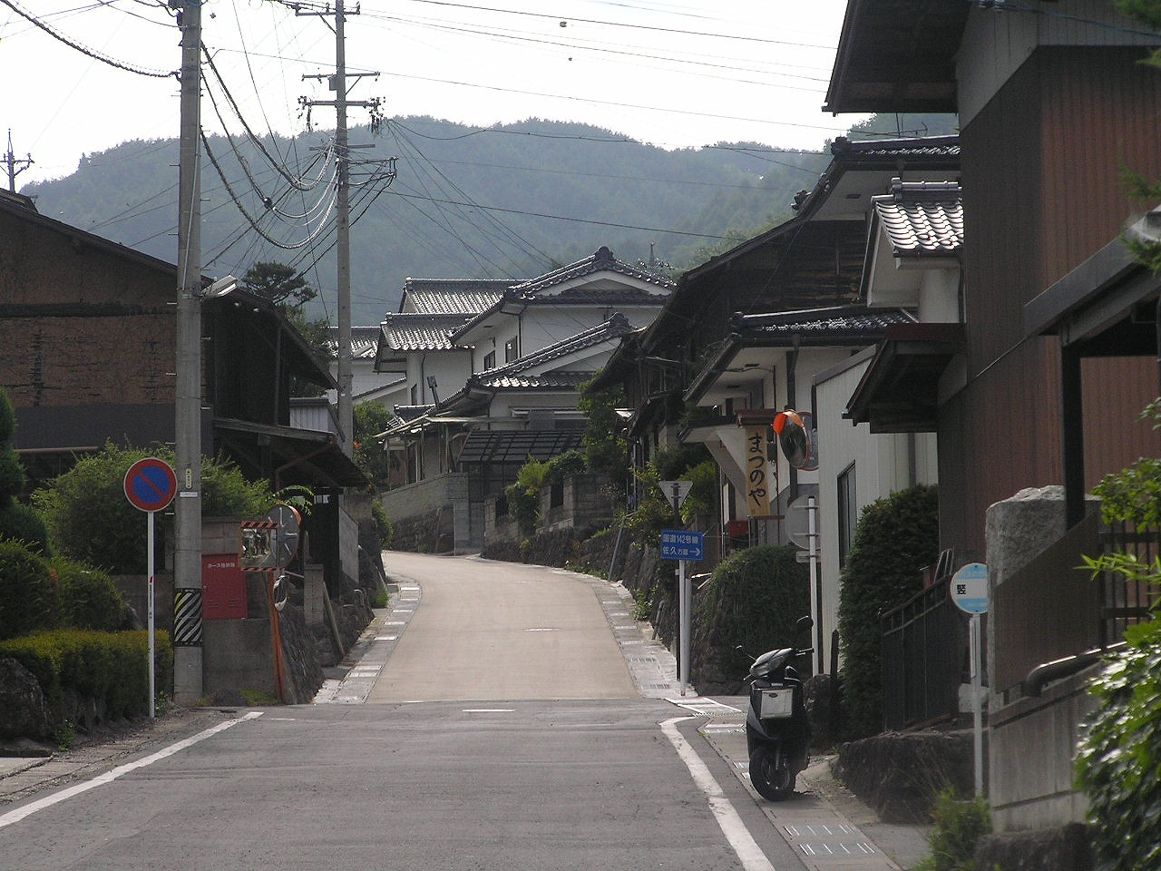 nagakubo-juku・長久保宿